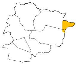 Localització de la solana d'Andorra